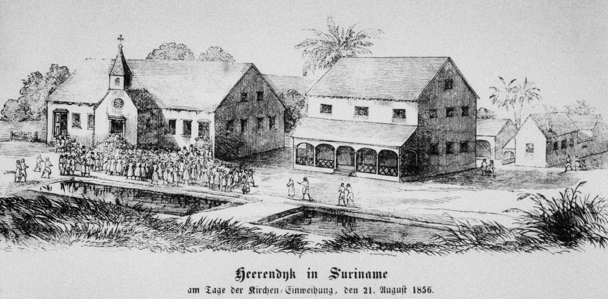 Tekening: Tekening van de inwijding van de zendingspost Heerendijk in Suriname aan de Commewijnerivier (opmerking: Reproductie uit archief van de Evangelische Broedergemeente Suriname te Paramaribo.)